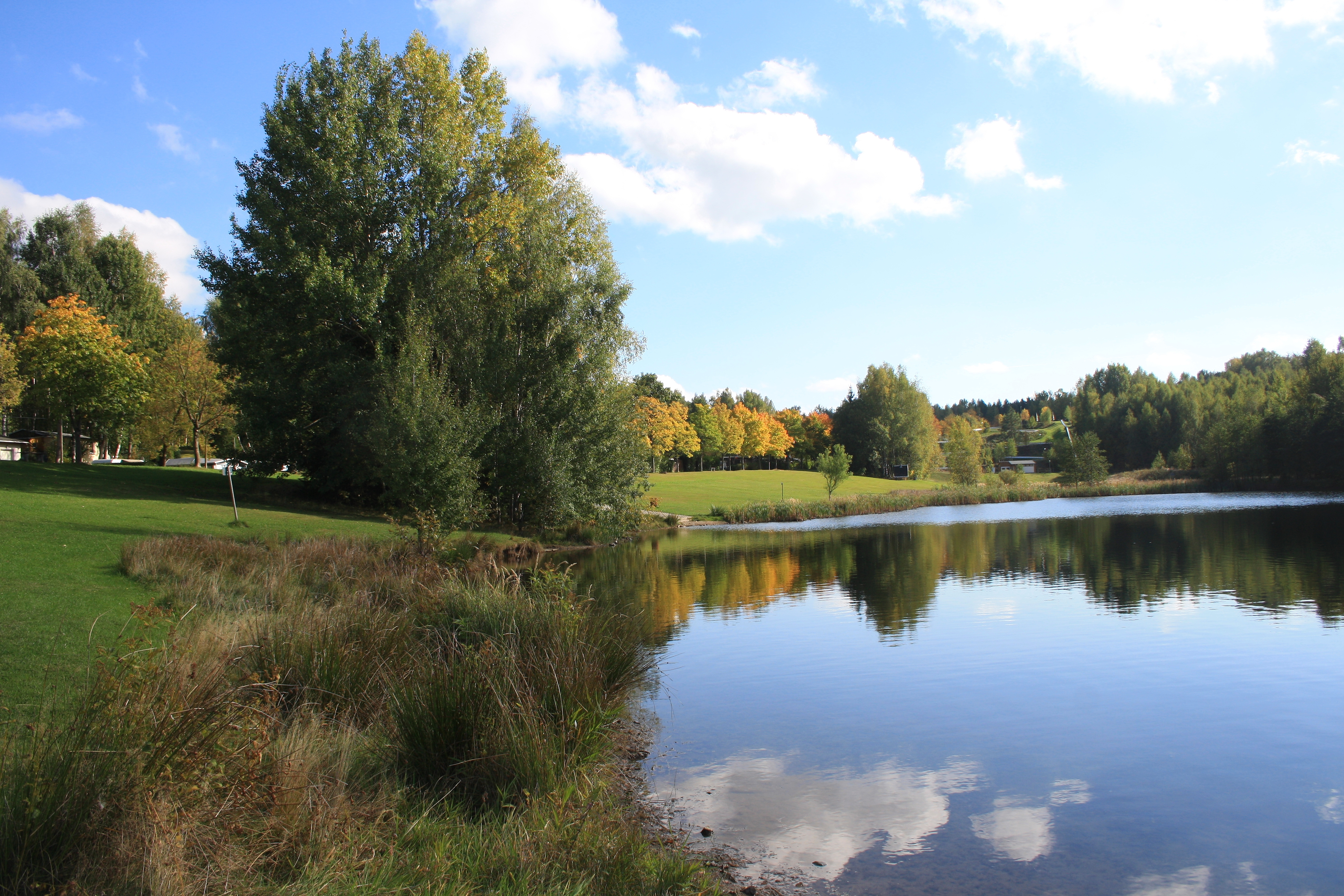 Stausee Oberwald in Callenberg, Landkreis Zwickau, Sachsen